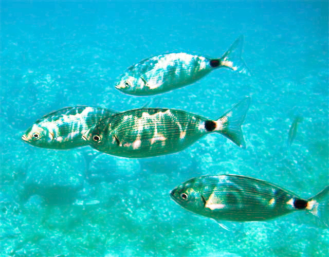 Area Marina Protetta Capo Gallo, Palermo, Sicily Oblada melanura